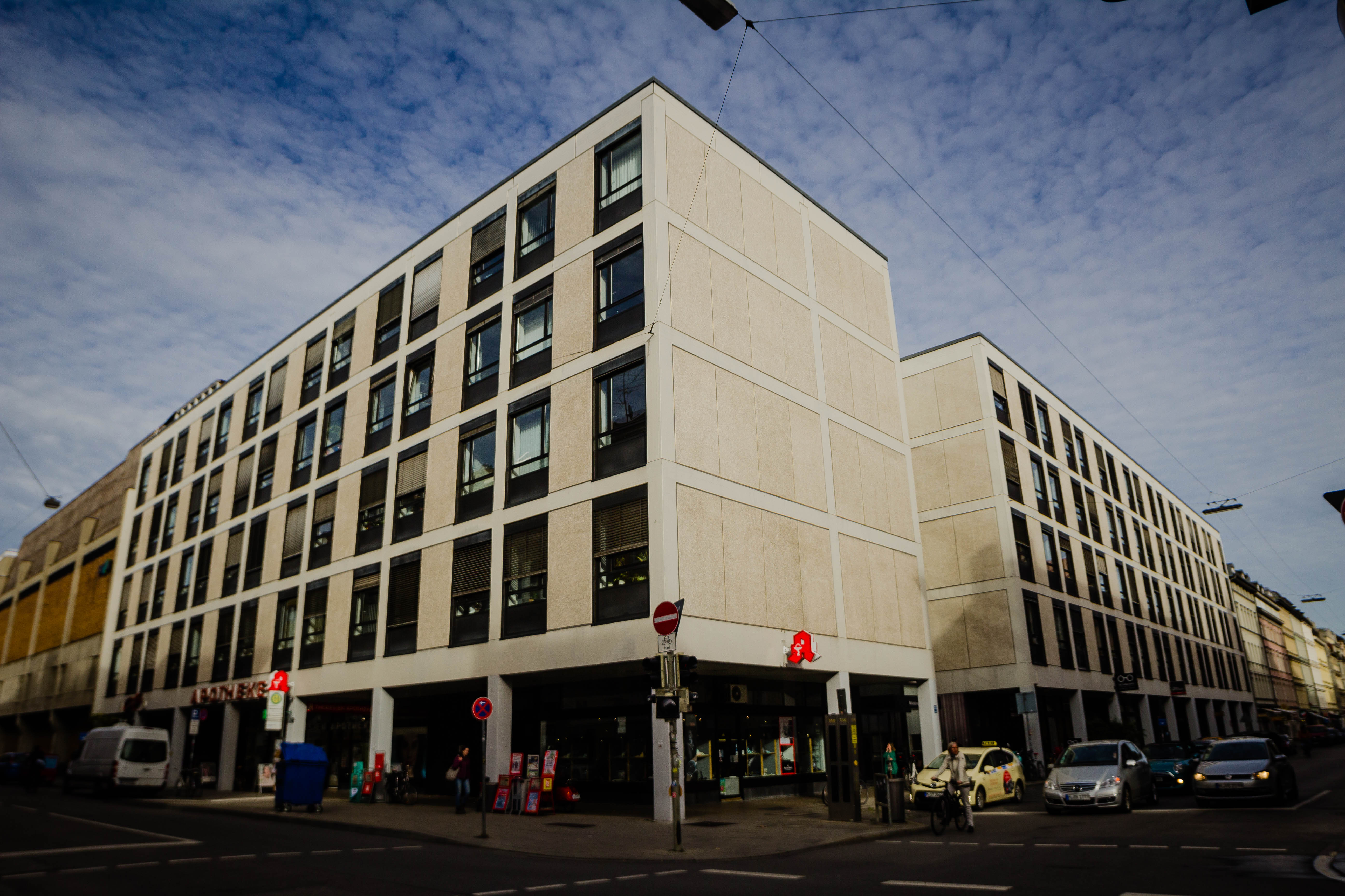 Sitz der Max Planck Digital Library in München